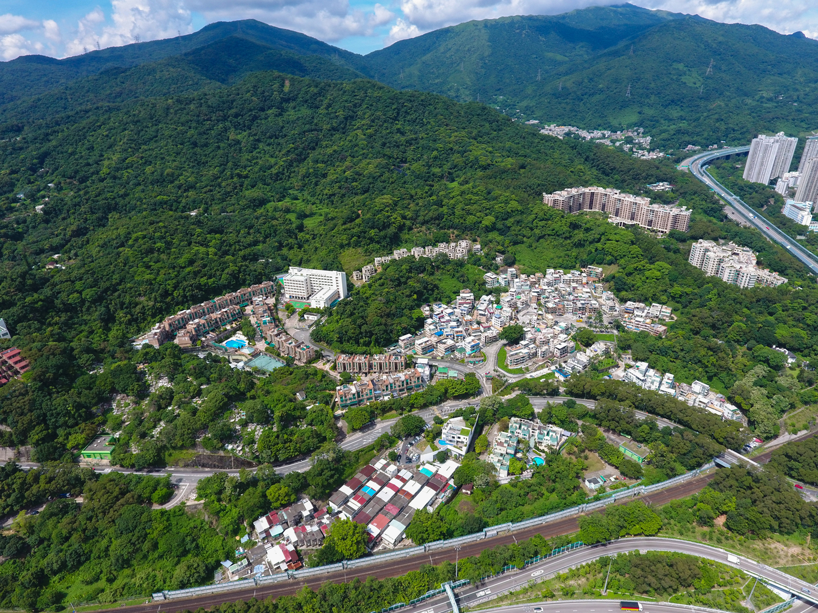 Tai Po Kau